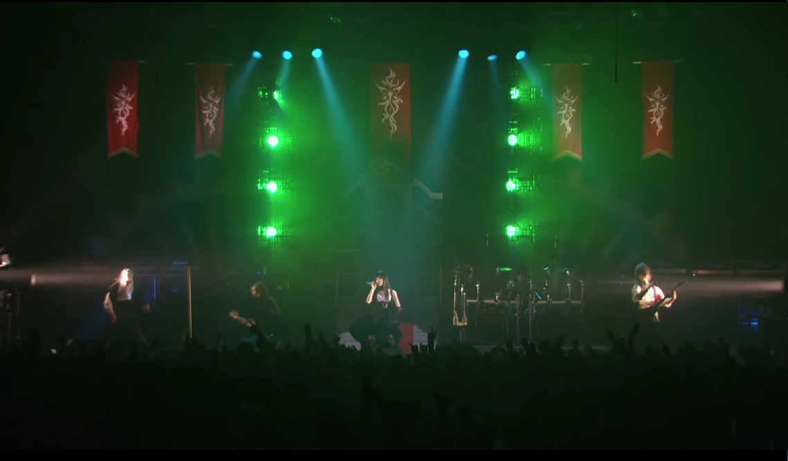 Yousei Teikoku: Live Pax Vesania Tour - 2013